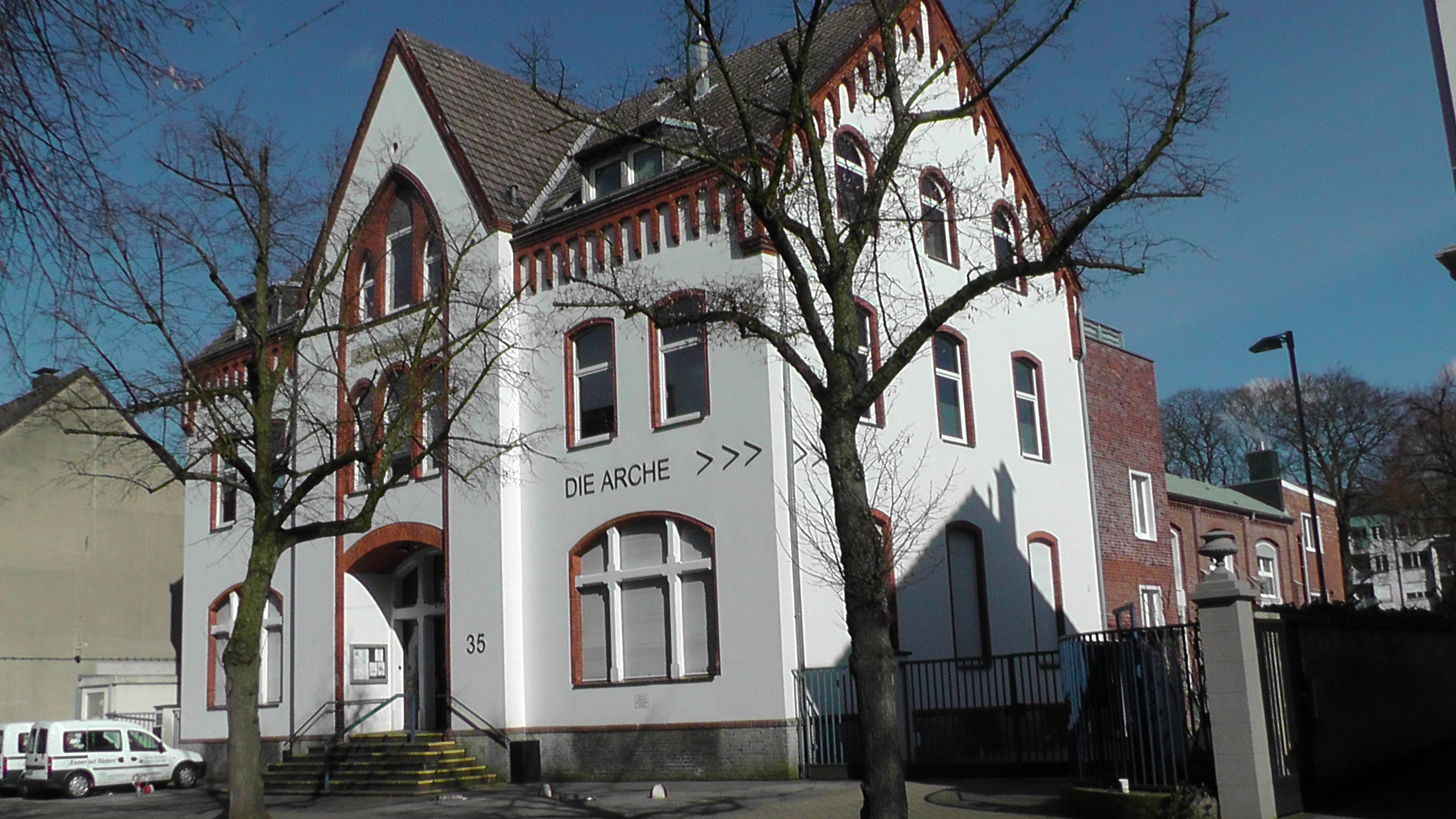 Hilden, Schulstraße 35, Josef Kremer Haus , ehemals ev. Gemeindehaus